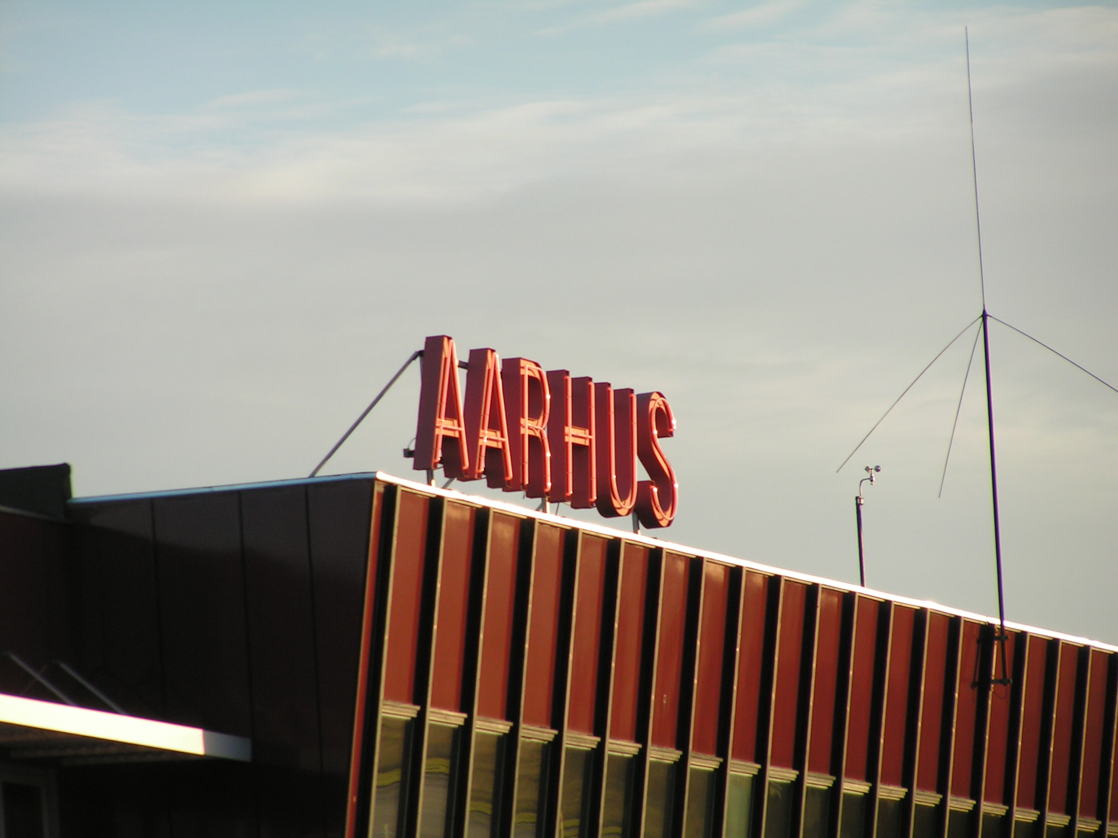 Destinationsskilt, Aarhus Lufthavn